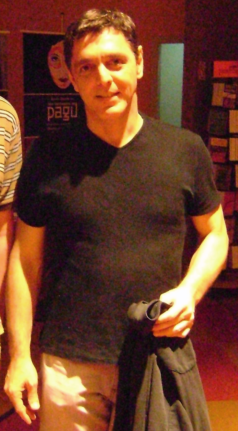 Guilherme Leme, ator brasileiro, após a apresentação da peça "O Estrangeiro", no Teatro Eva Herz, em São Paulo.